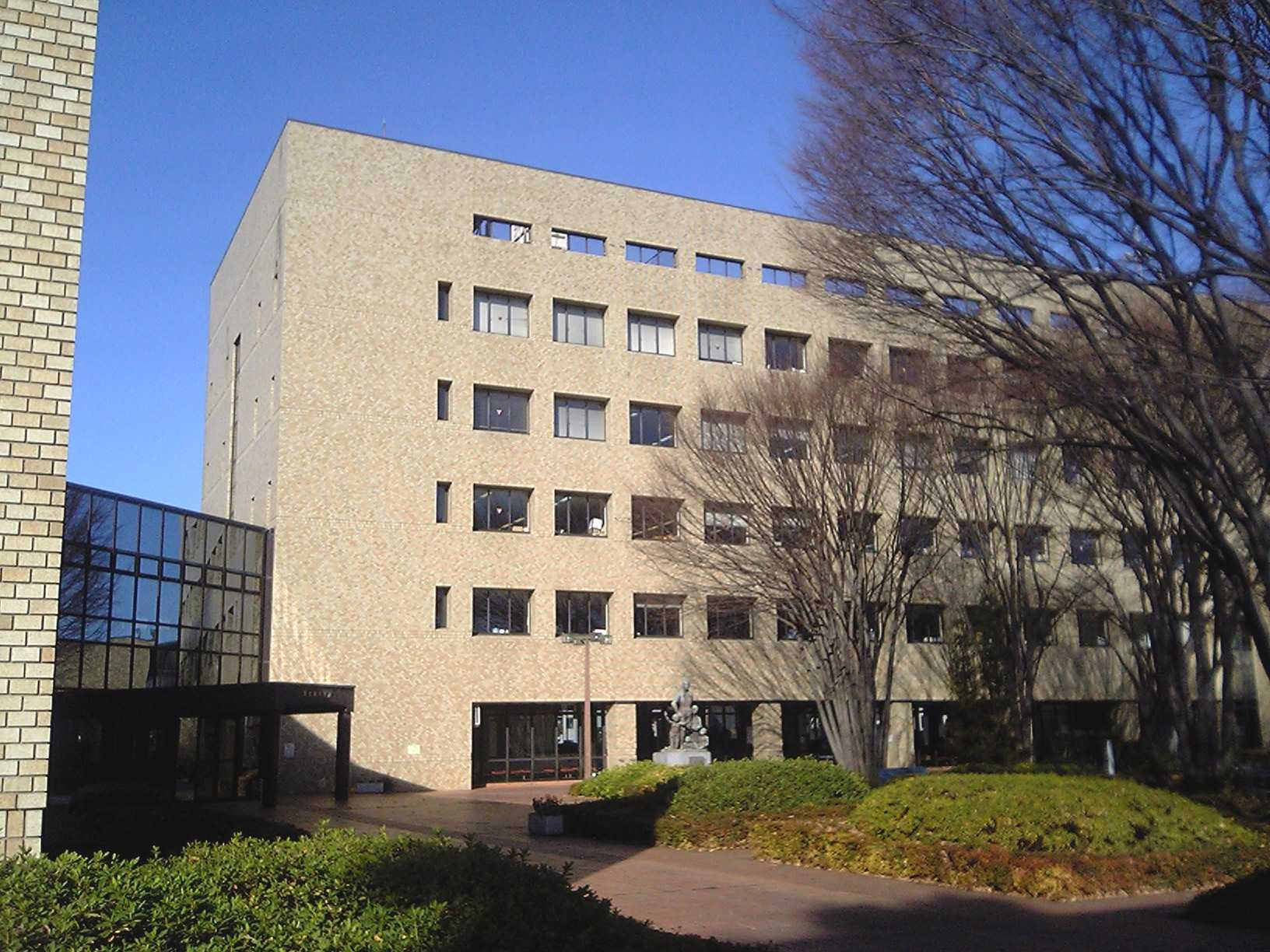 Higashiyamato City Hall, Tokyo, Japan (東大和市役所 (東京都))